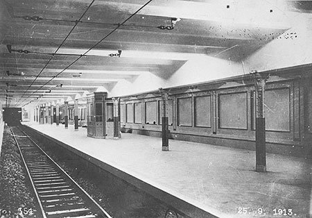 La estación antes de su inauguración